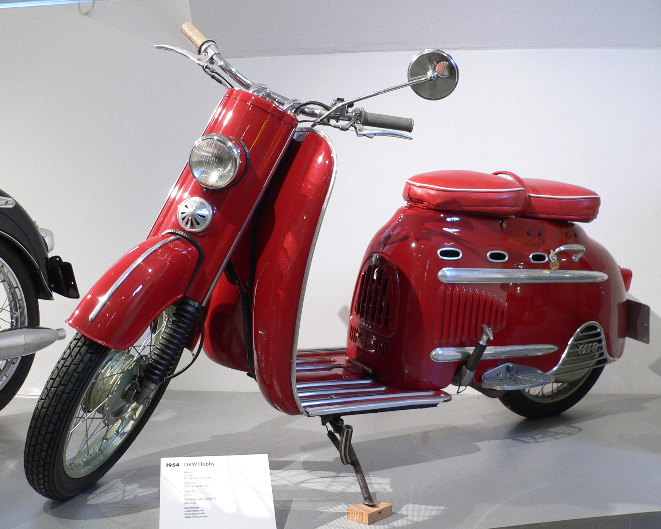 Motor scooter "DKW Hobby" (1954) at the Deutsches Zweirad- und NSU-Museum (74 cm³, Einzylinder-Zweitakt-Motor, 3 PS bei 5.000 U/min., 60 km/h)